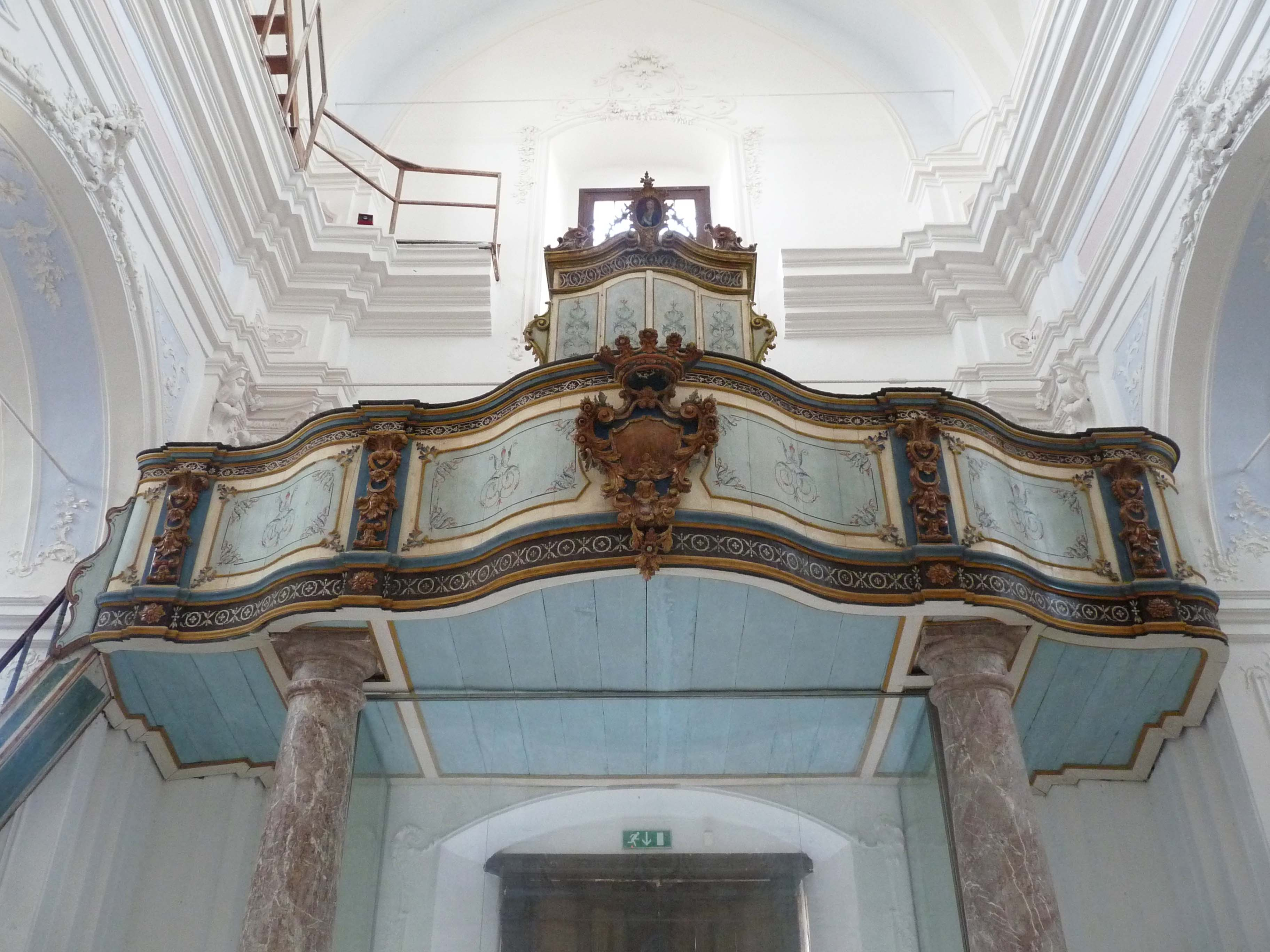 Chiesa dell'Immacolata (Lipari, îles Eoliennes, Sicile)